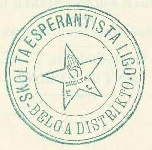 stampo de Skolta Esperantista Ligo - Belga Distrikto, proksimume 1960